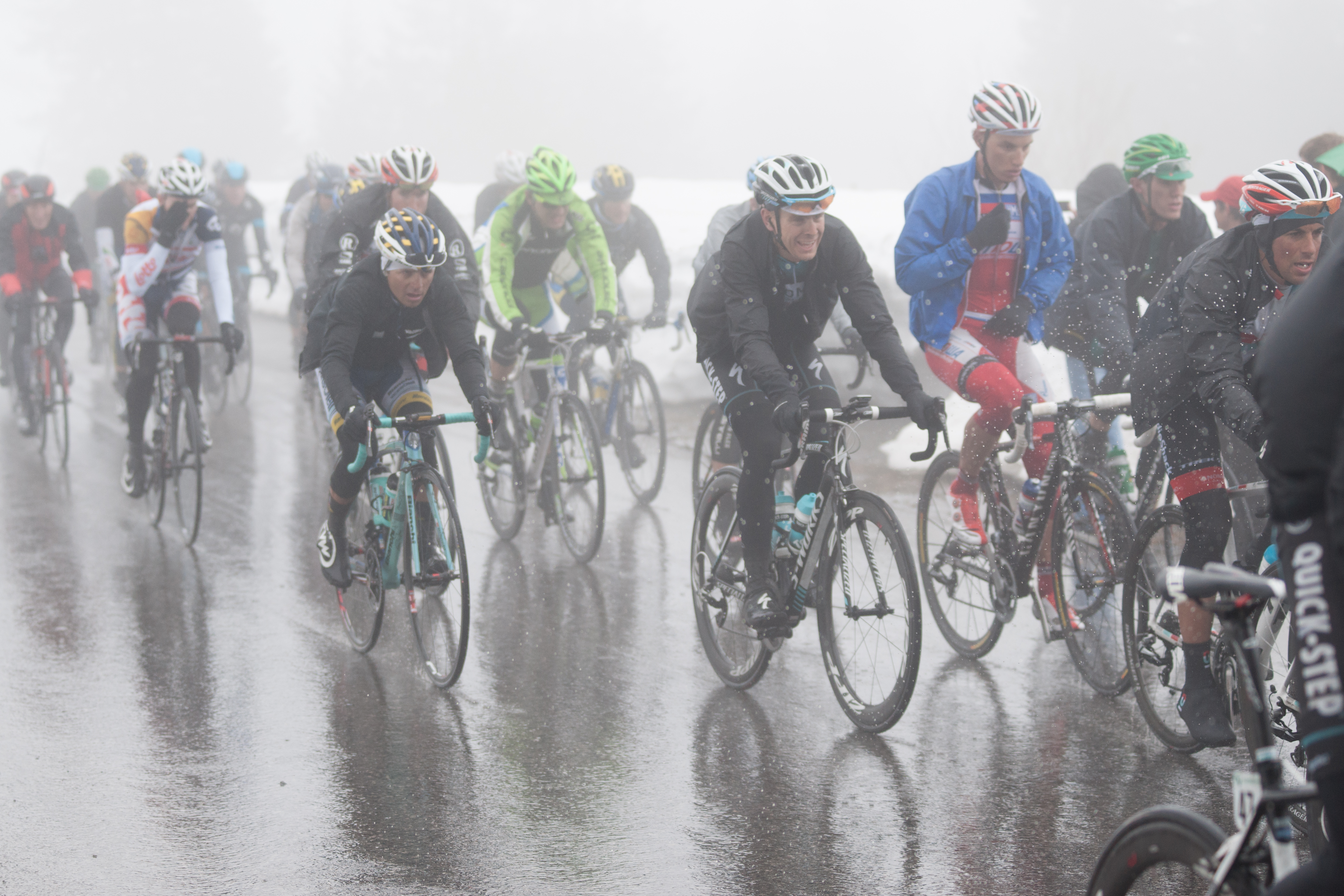 Tour de Romandie 2013, 4ème étape, col de la Croix.